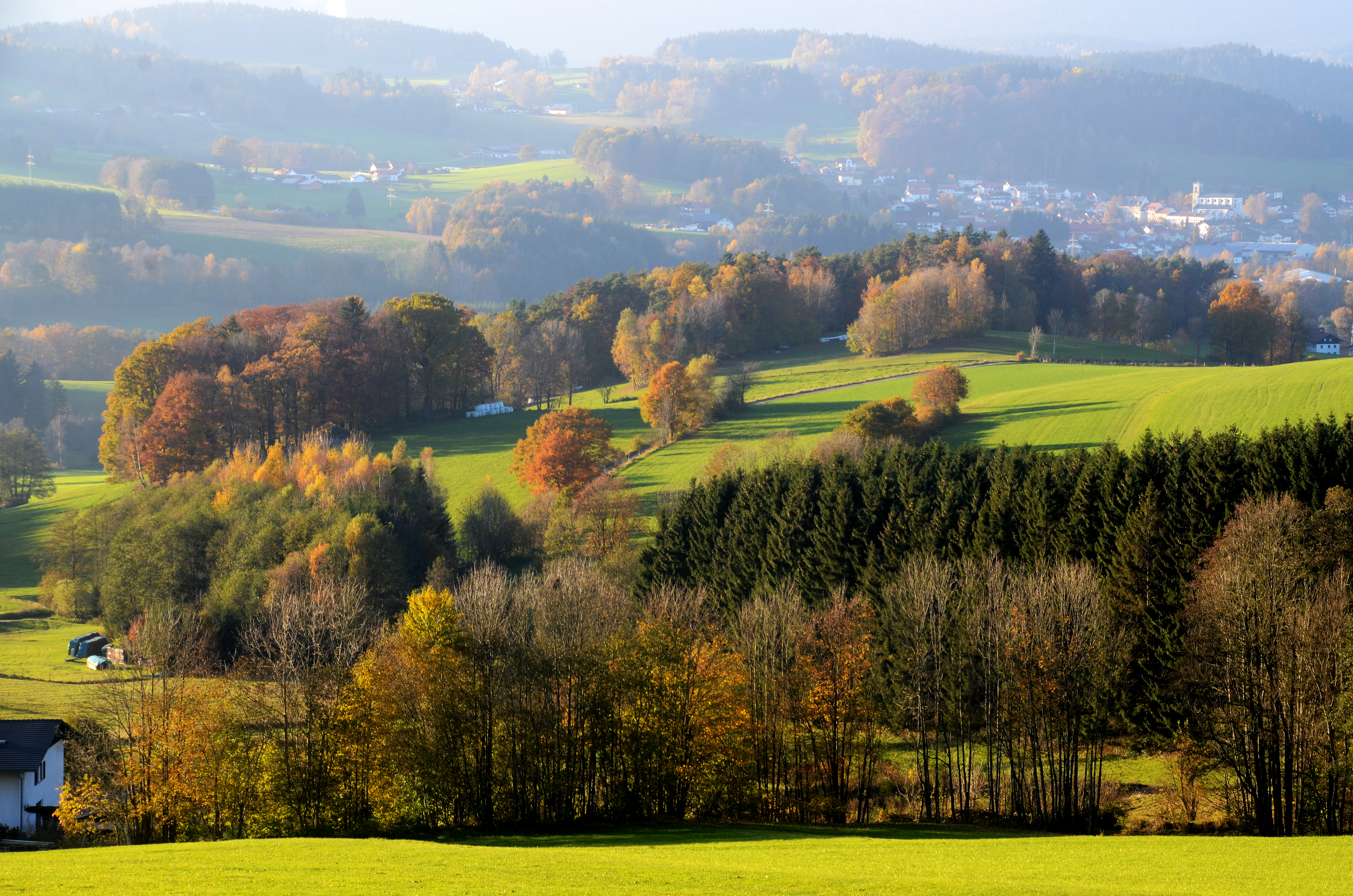 Tief eingebettet liegt Gotteszell im Teisnachtal